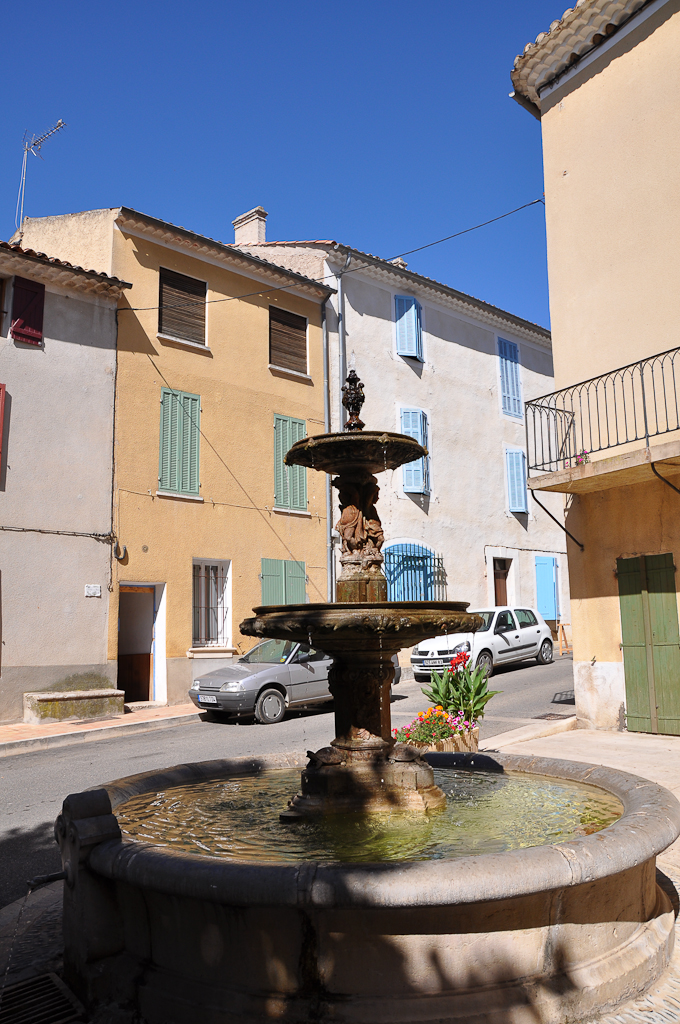 Fontaine à Quinson (Alpes-de-Haute-Provence, France).